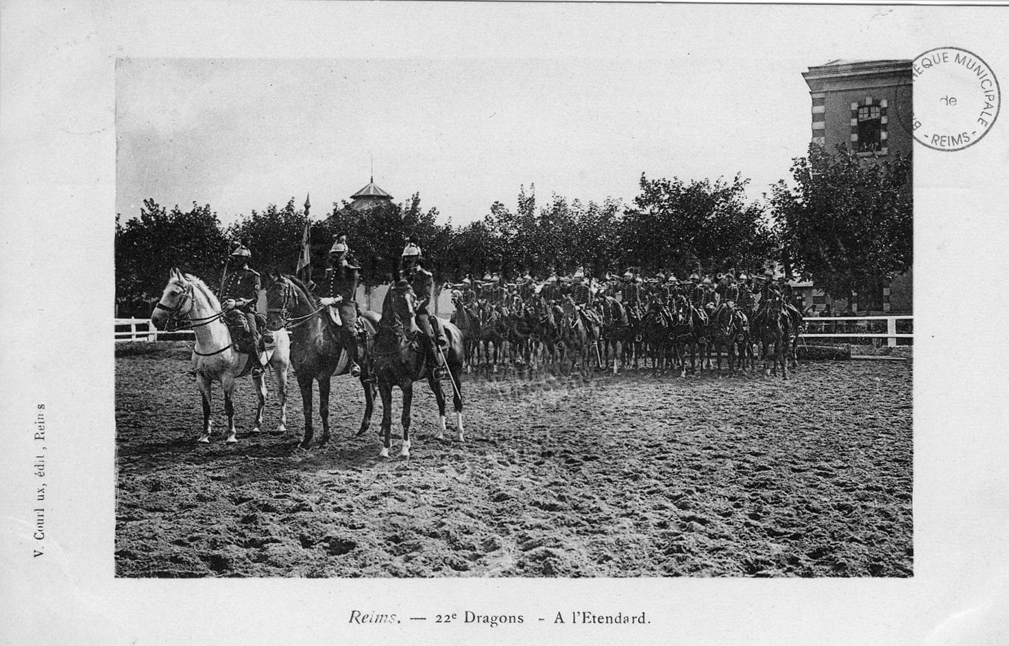 la carrière du 22e dragons, issu des collections de la B.MM. de Reims.